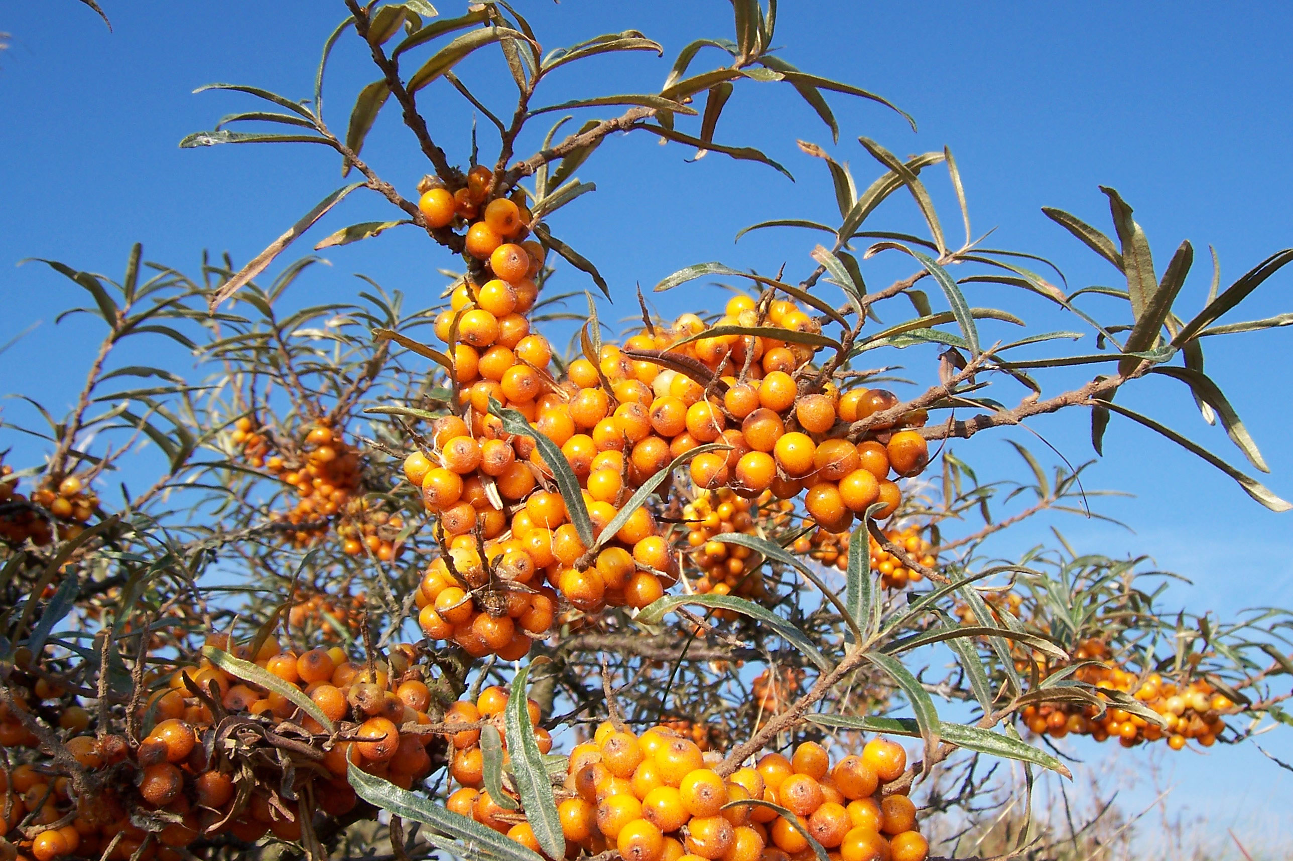 Nordseeinsel Spiekeroog: Sanddorn (Hippophae rhamnoides), auch Weidendorn genannt